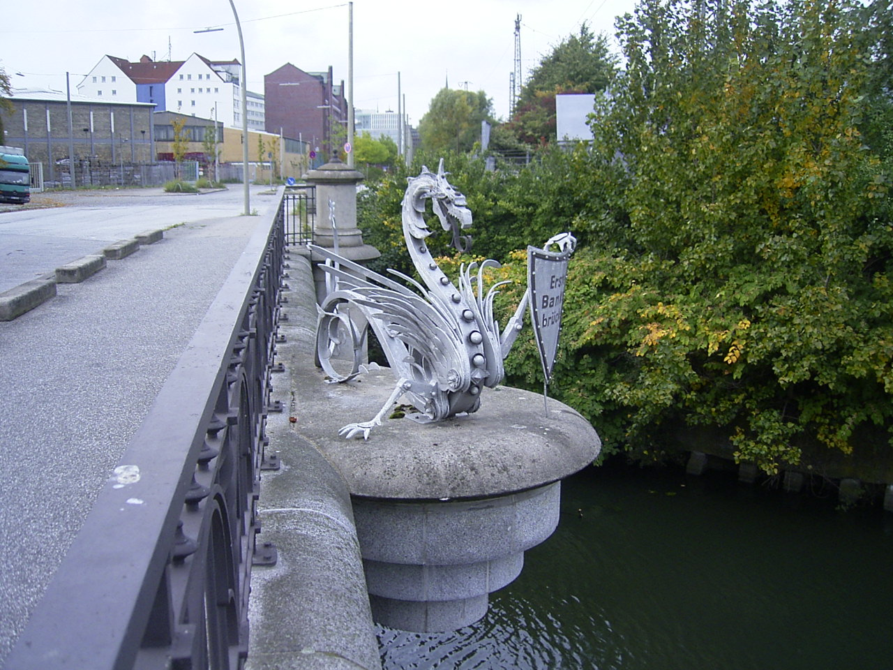 Skulptur an der Ersten Banksbrücke über den Mittelkanal in Klostertor